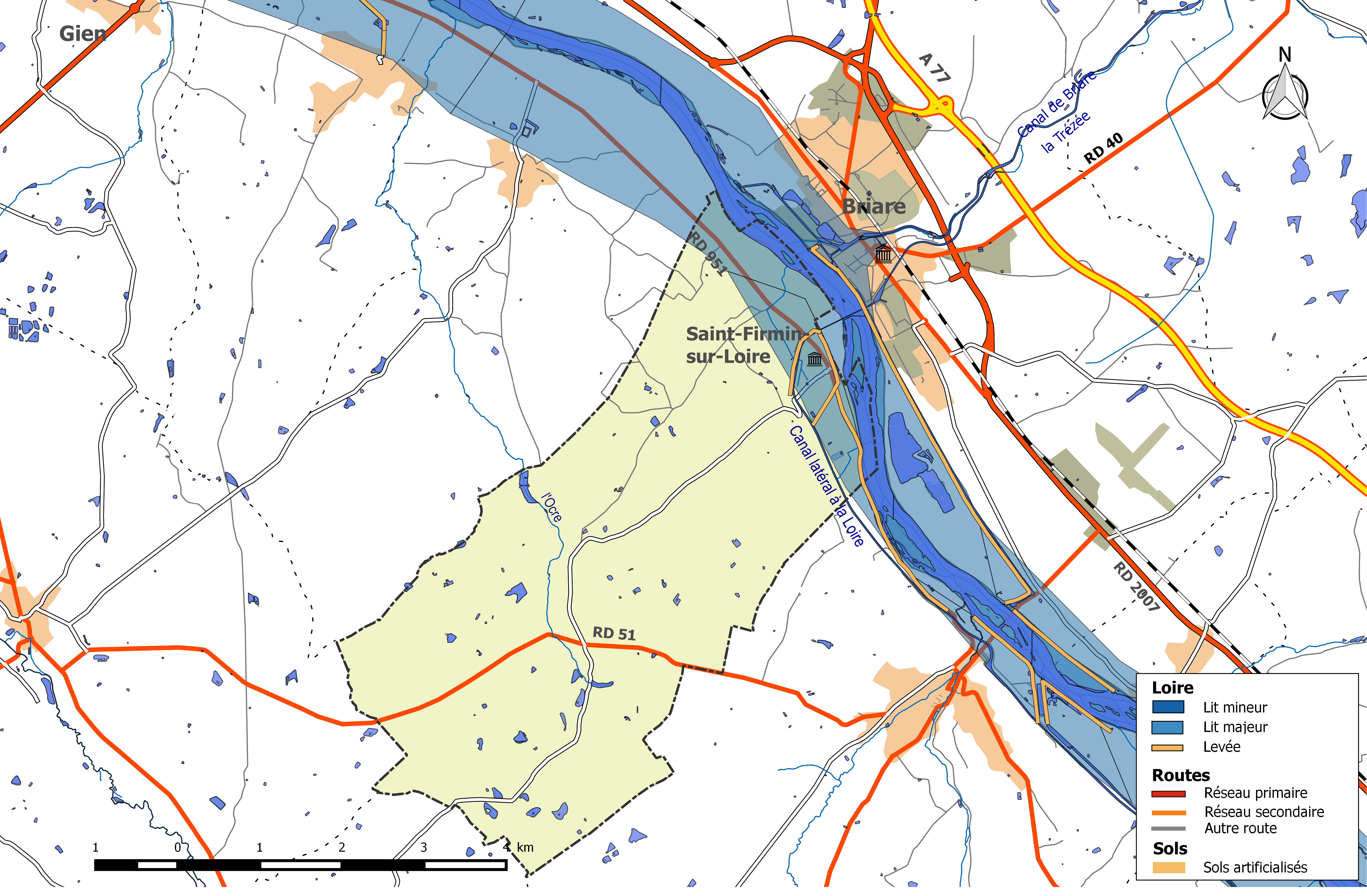 Zone inondable et réseaux hydrographique et routier de la commune de Saint-Firmin-sur-Loire